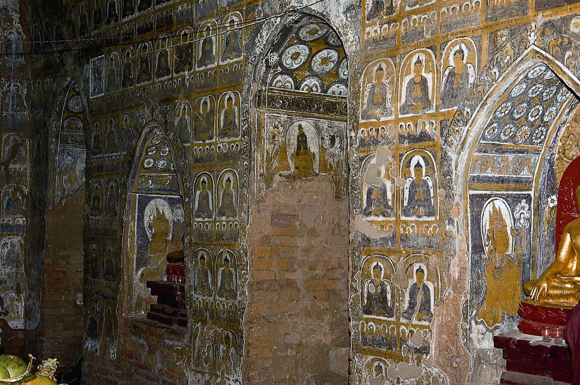 Sanctuaire de l'Alopyi-gu-hpaya, mur extérieur du déambulatoire couverts d'images du Bouddha enseignant et avec Bodhisattvas peints sur les murs latéraux des fenêtres et niches